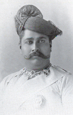 Shivajirao Holkar ,The Maharaja Holkar of Indore